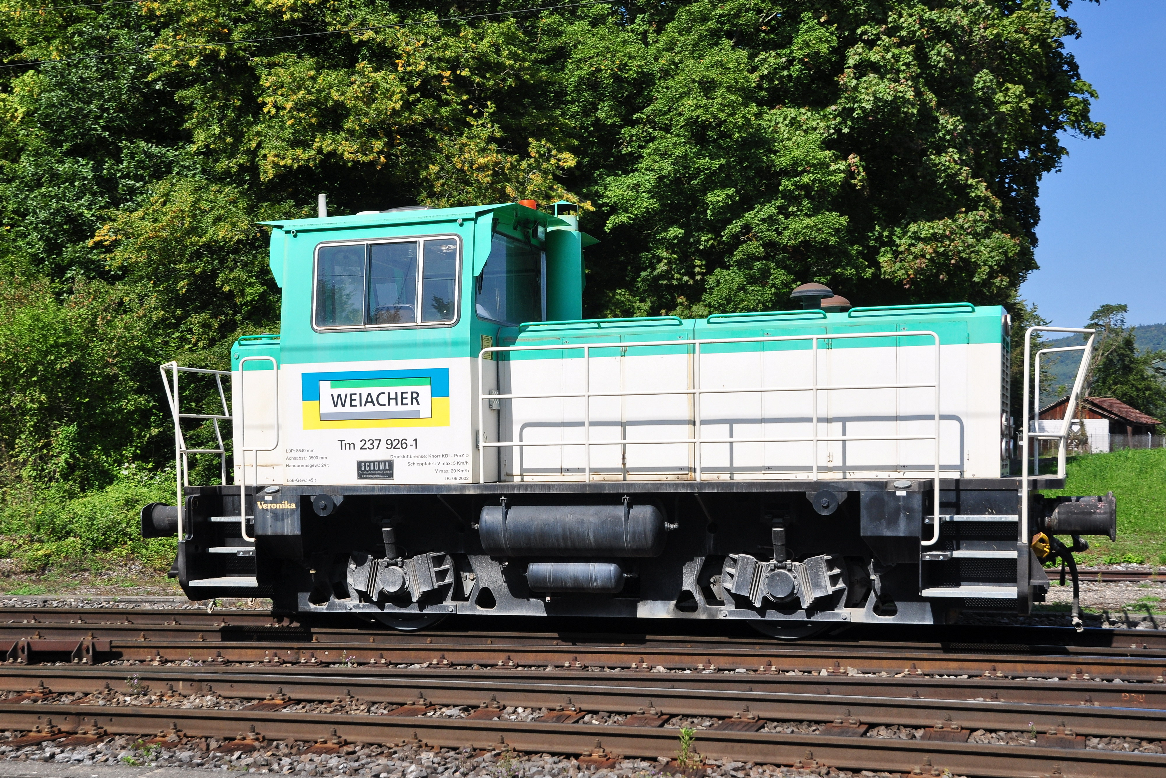 Weiacher Kies, Zweidlen in Glattfelden (Switzerland)